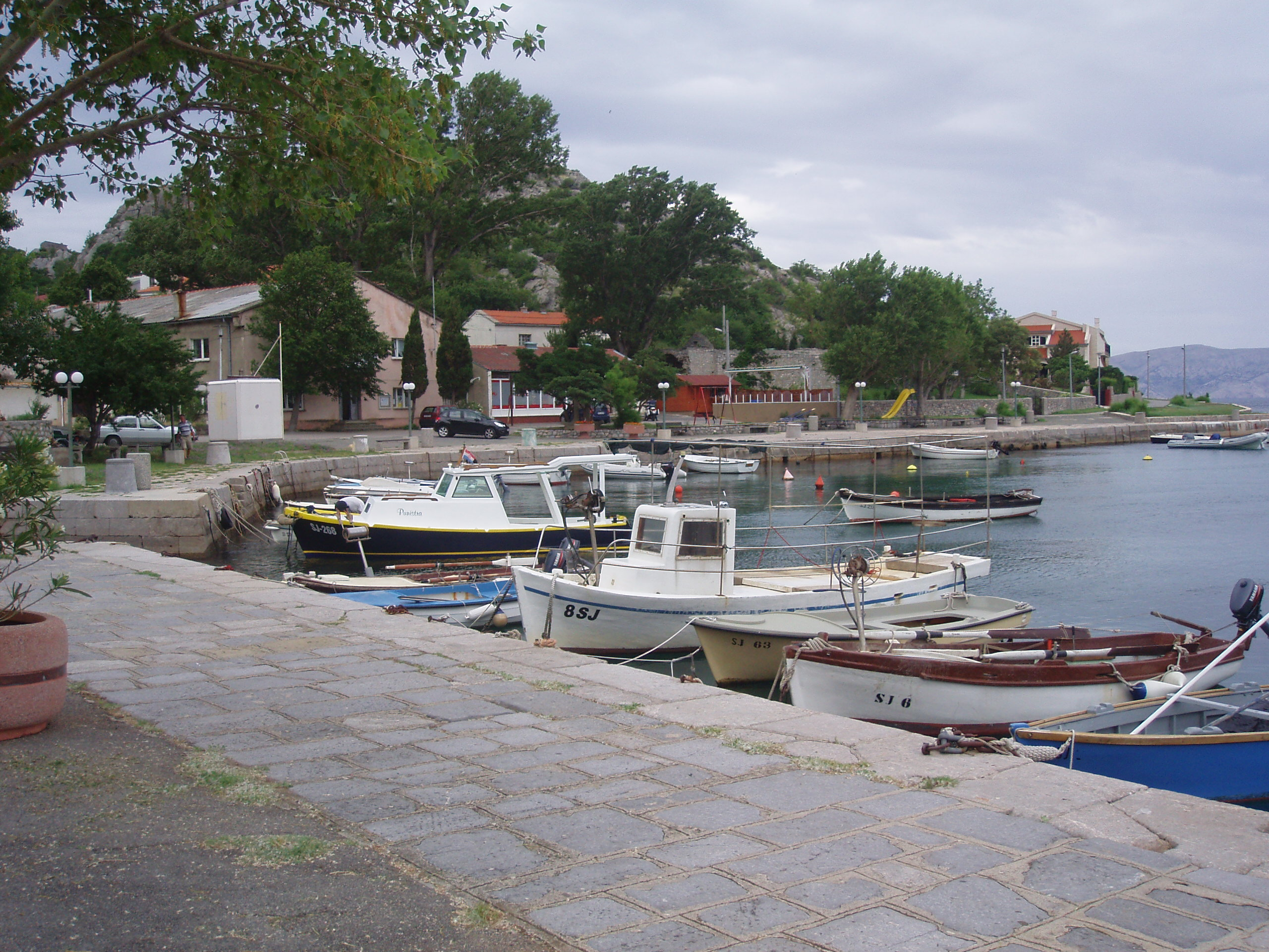 Přístav ve vesničce Sveti Juraj